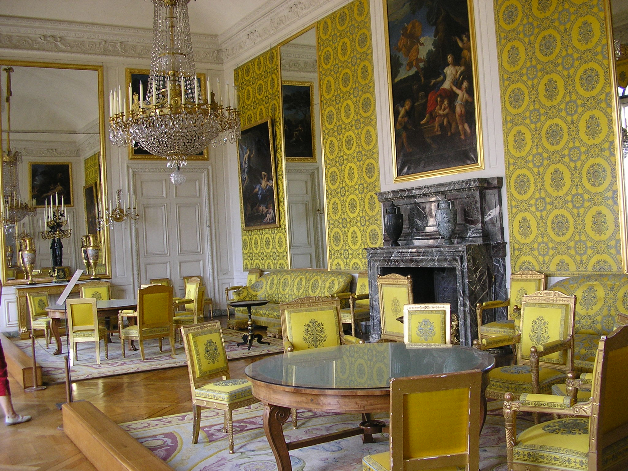 La sala amarilla del Grand Trianon, uno de los palacios que constituyen el recinto del Palacio Real de Versailles.